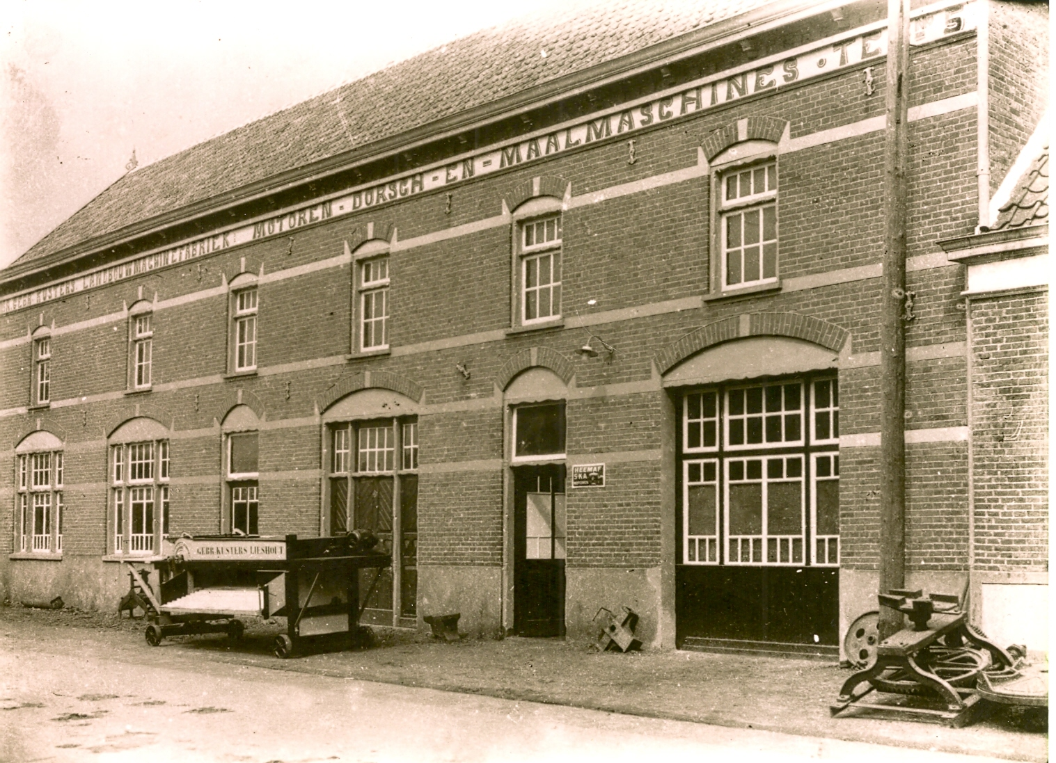 Het pand van de voormalige firma Kusters aan de Dorpsstraat te Lieshout